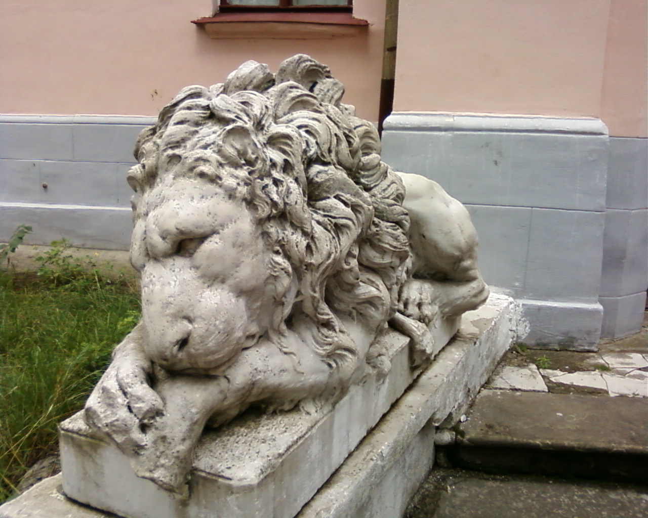 Лев ліворуч від входу до садиби у Наталівському парку, с-ще Володимирiвка